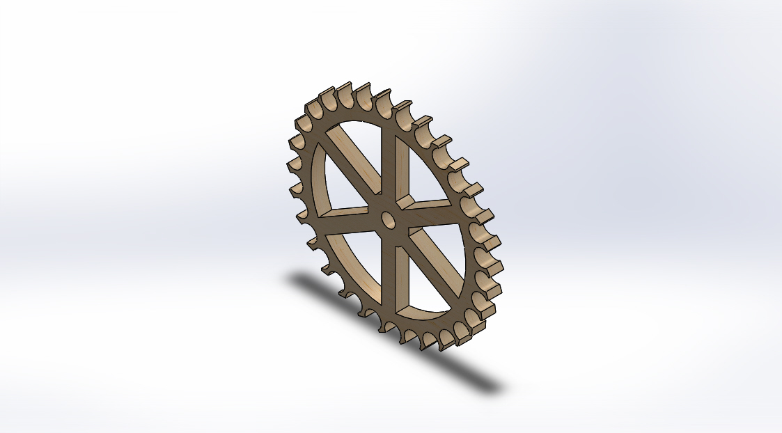 גלגל תזמון